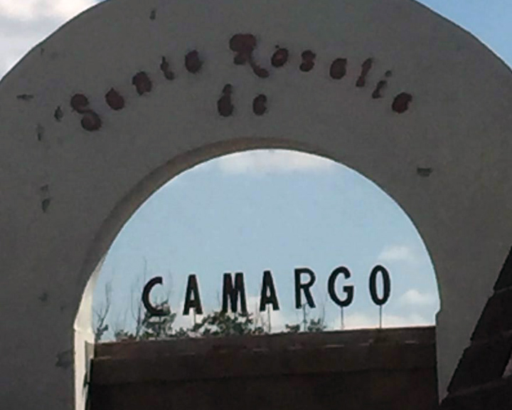 Stella nombre Santa Rosalía de Camargo, Chihuahua.